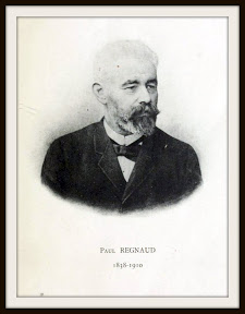 Portrait photographique en buste de Paul Regnaud (1838-1910)